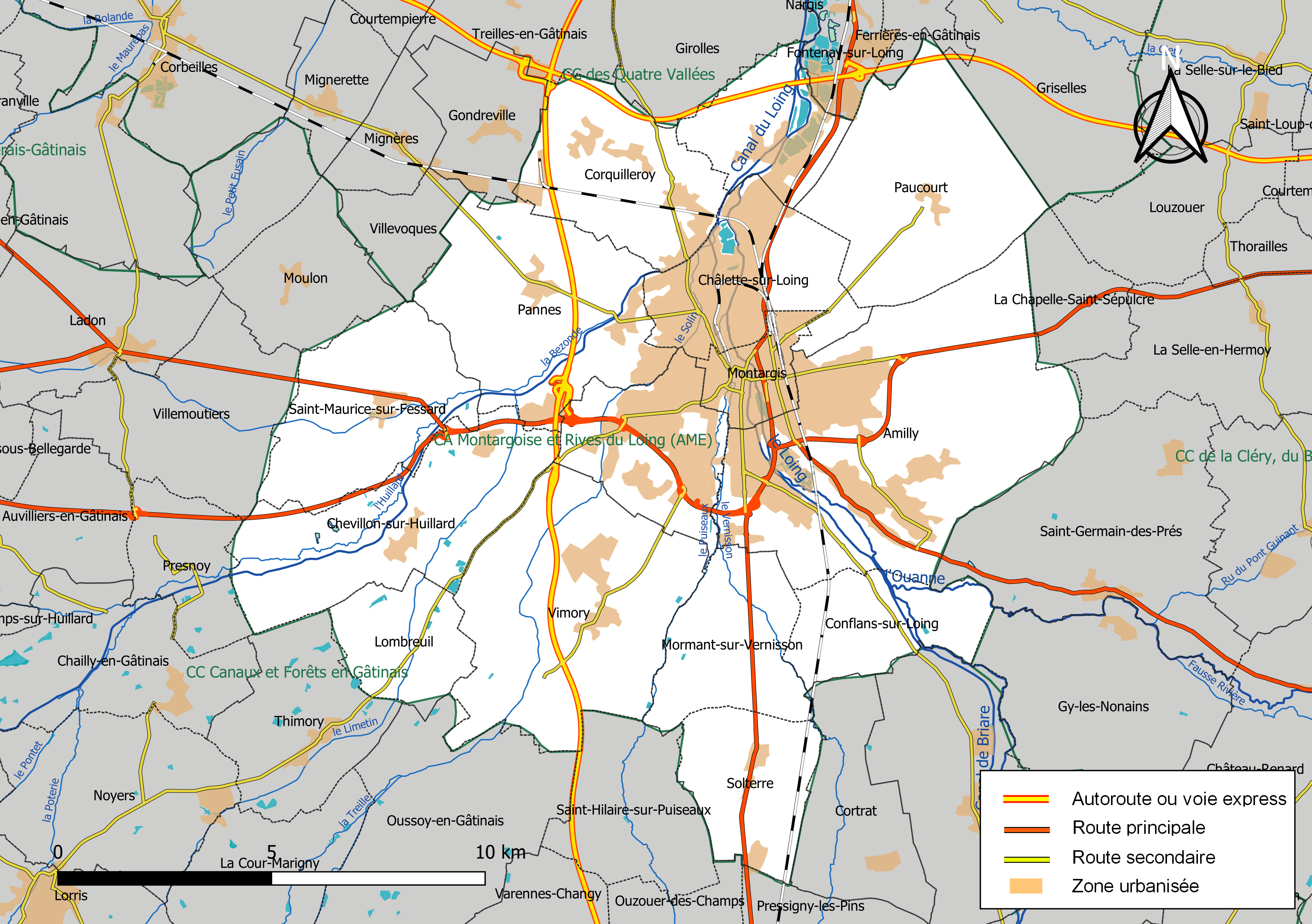 Carte géographique de l'intercommunalité Agglomération montargoise et rives du Loing, département du Loiret, France. Composition au 1er janvier 2019.